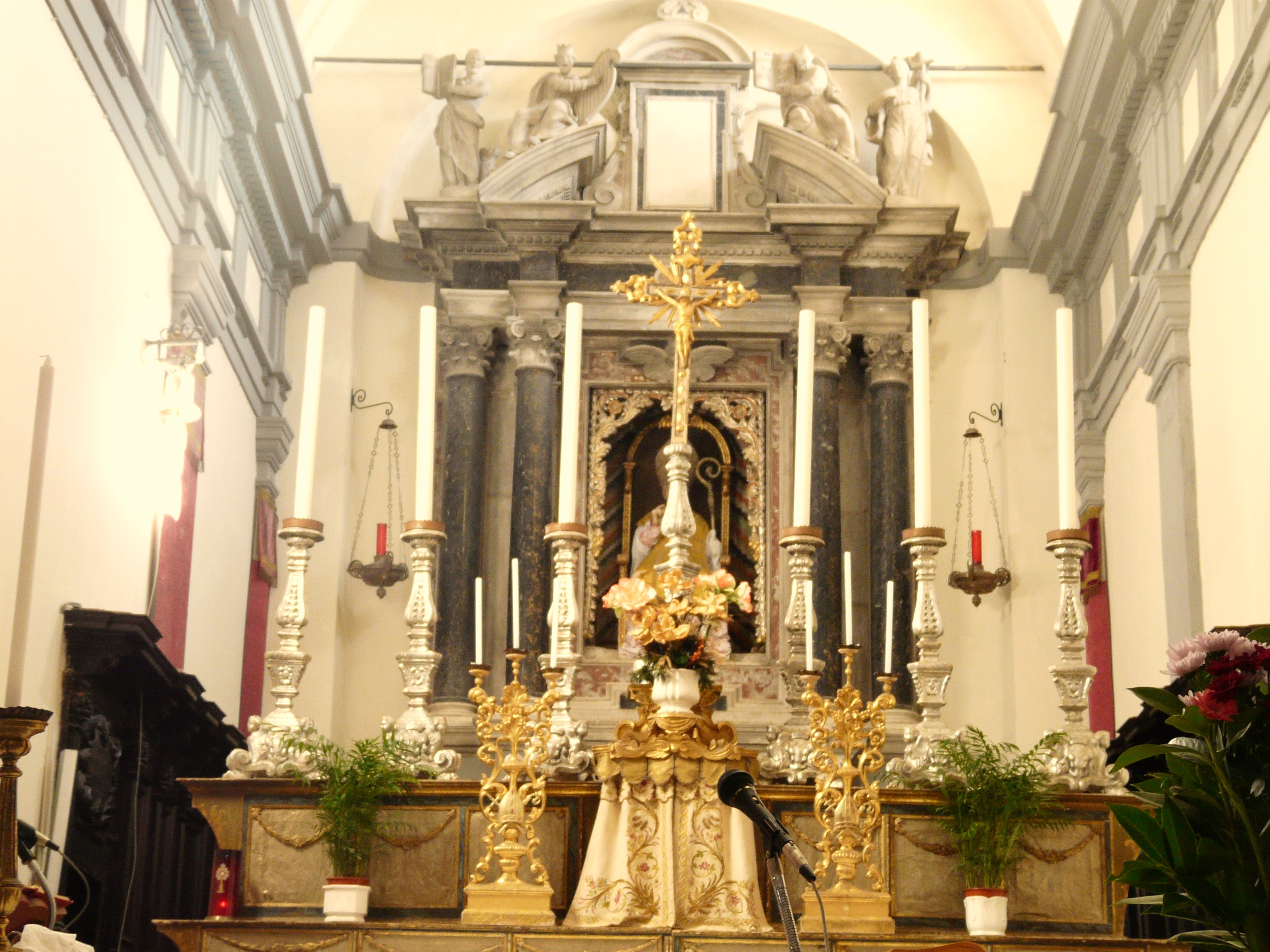 Chiesa-Santuario di San Remigio, Fosdinovo, Toscana, Italia